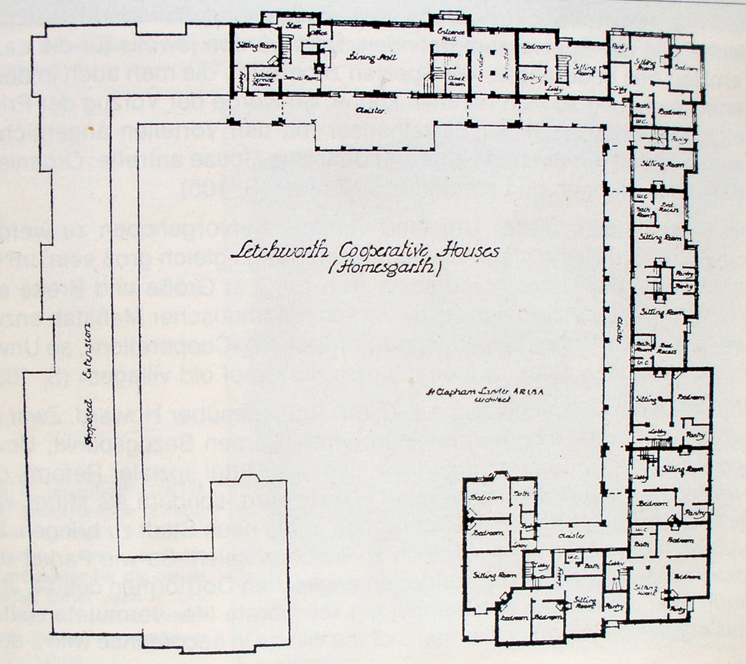 plan homegarth letchworth gardencity